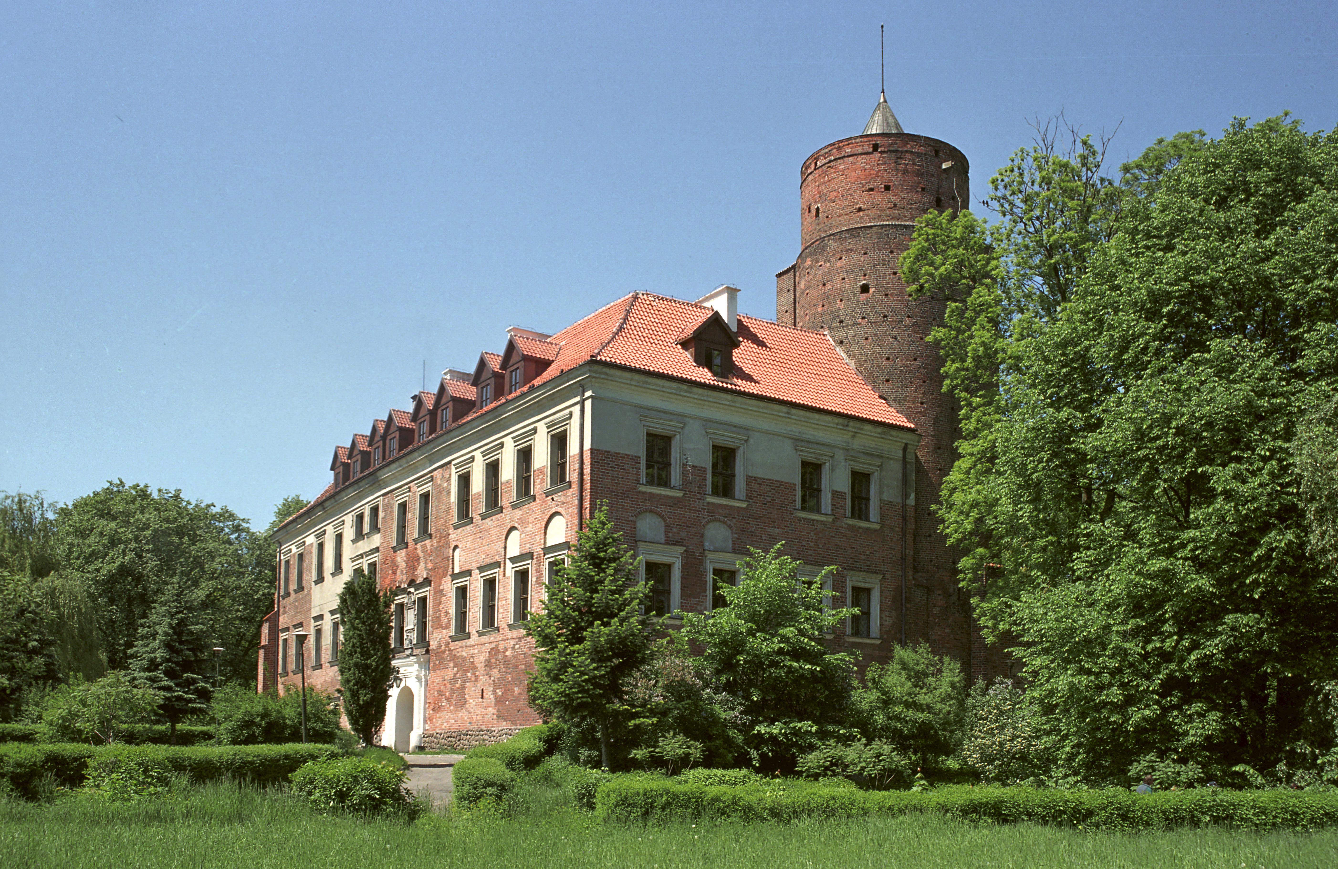 Uniejów